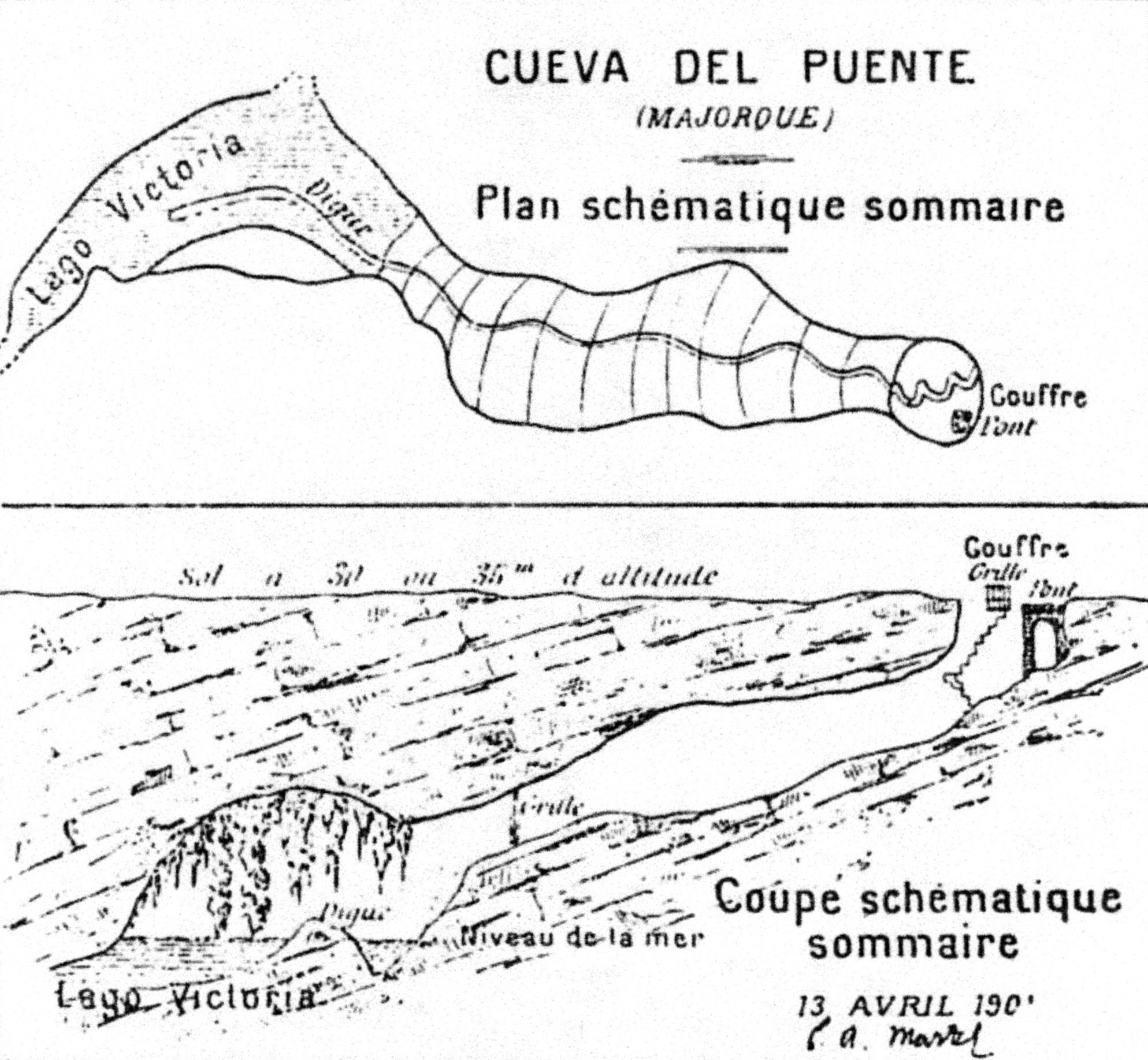 Schematische Skizze der Cova des Pont an der Ostküste von Mallorca, Spanien